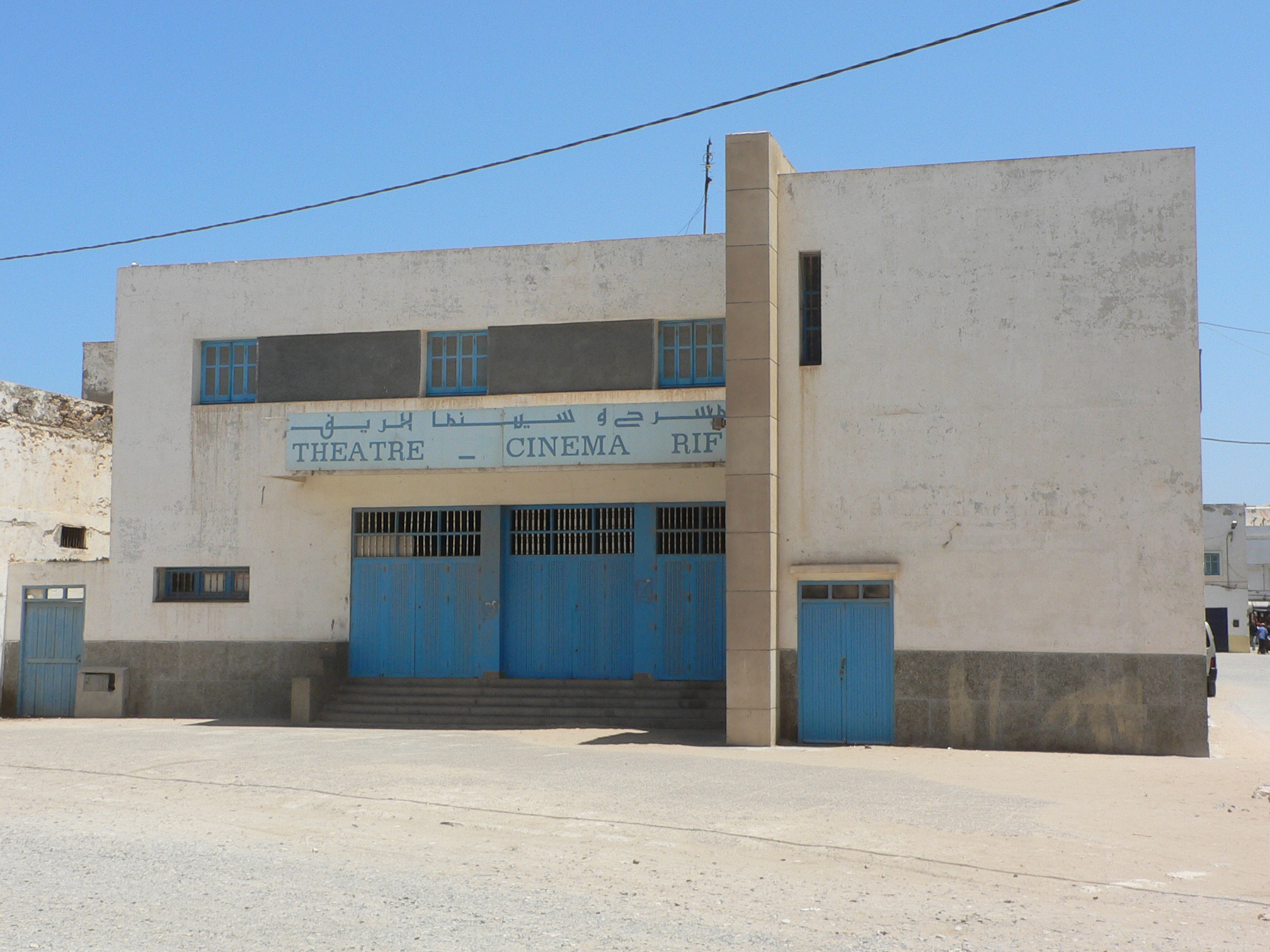 Cine Rif Essaouira - Viaje en Marruecos